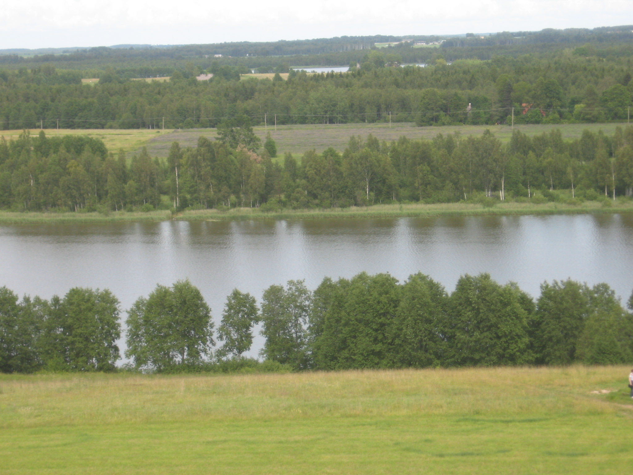 Raigastvere järv